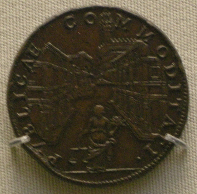 Domenico poggini, medaglia bronzea di cosimo I de' medici, creazione degli uffizi